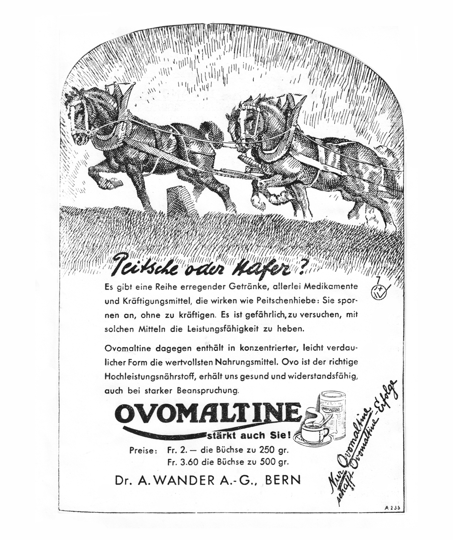 Ovomaltine-Anzeige